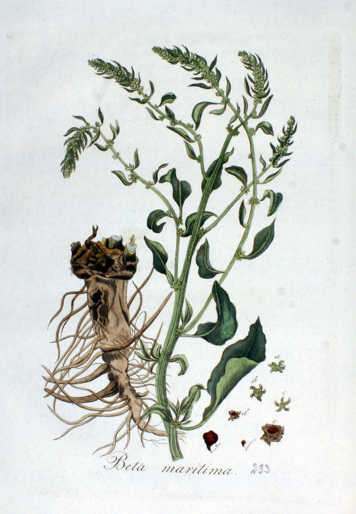 Beta vulgaris L. subsp. maritima (L.) Archang. (Syn. Beta maritima L.)